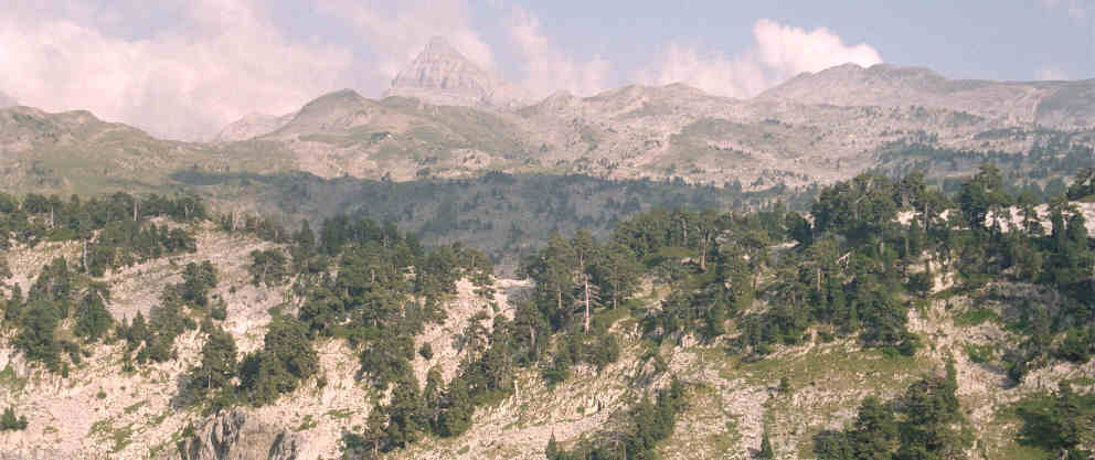 Macizo de Larra-Belagua, en la provincia de Navarra, (España). Tomada por JMSE el 10 de julio de 2003 y cedida a Wikipedia. Categoría:España (imagen) Categoría:Fotografía (imagen) Categoría:Geología (imagen)